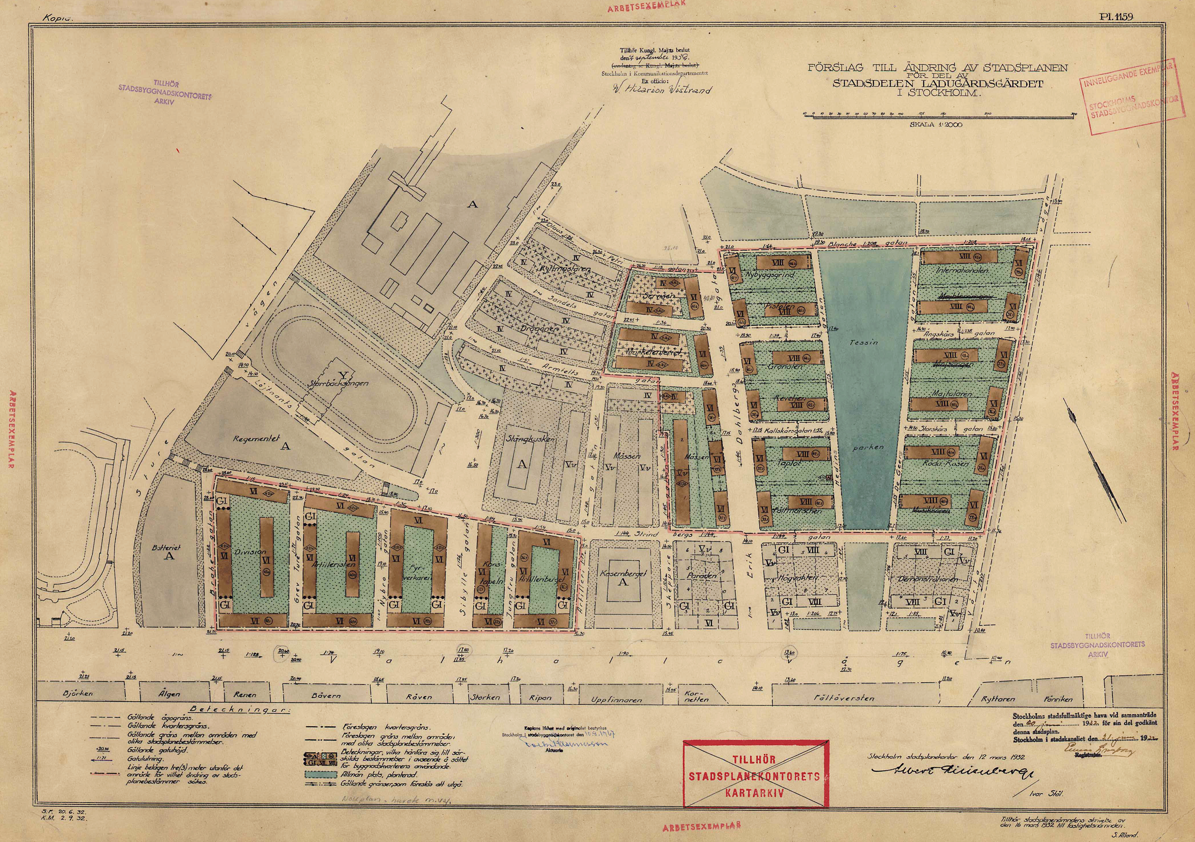 Stadsplan för västra Gärdet (ej fullbordad)